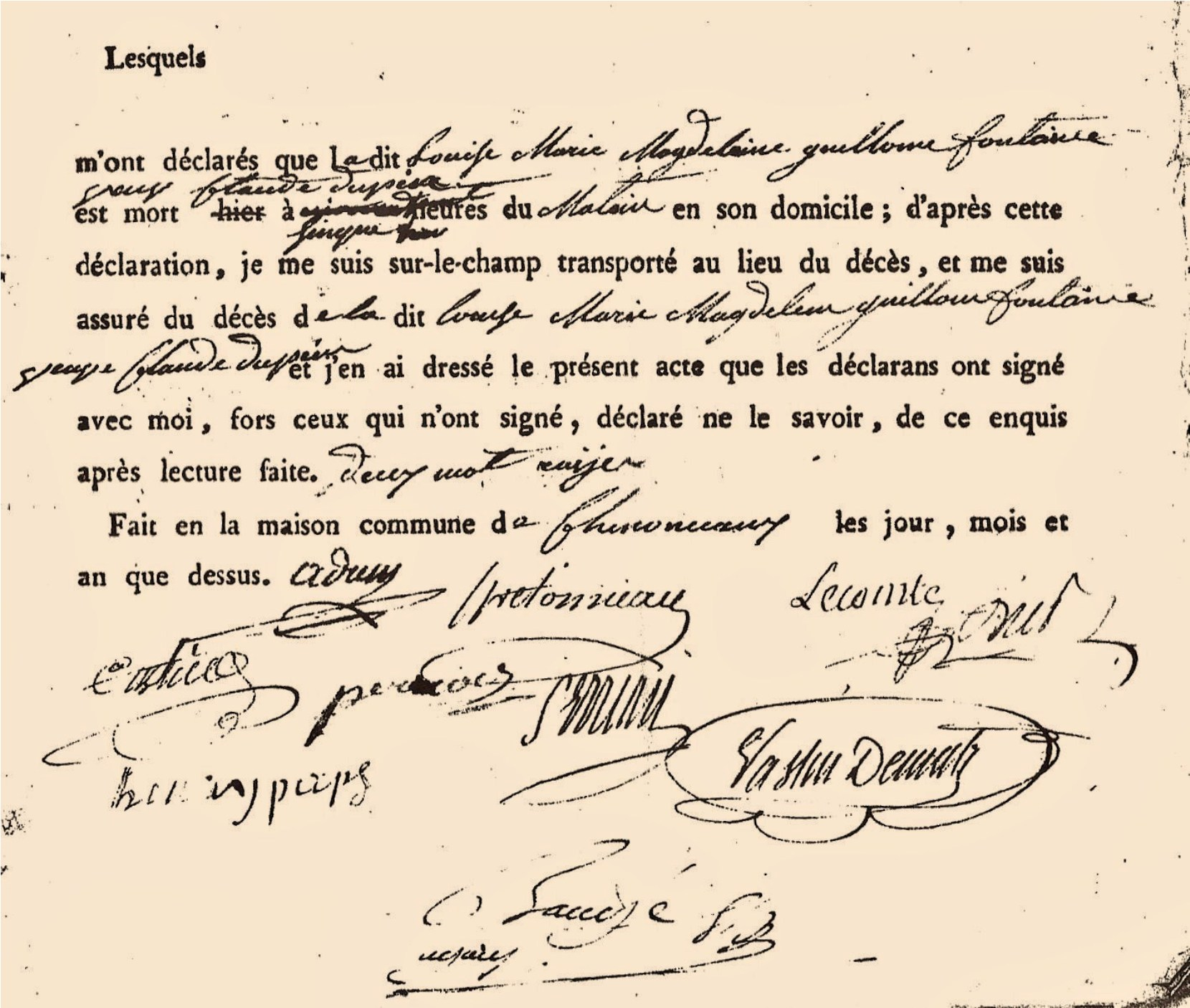 Extrait de l'acte de décès de Louise de Fontaine (1706-1799), veuve du fermier général Claude Dupin (1686-1769). Louise de Fontaine-Dupin meurt dans sa propriété du château de Chenonceau, le 30 brumaire An VIII (20 novembre 1799).